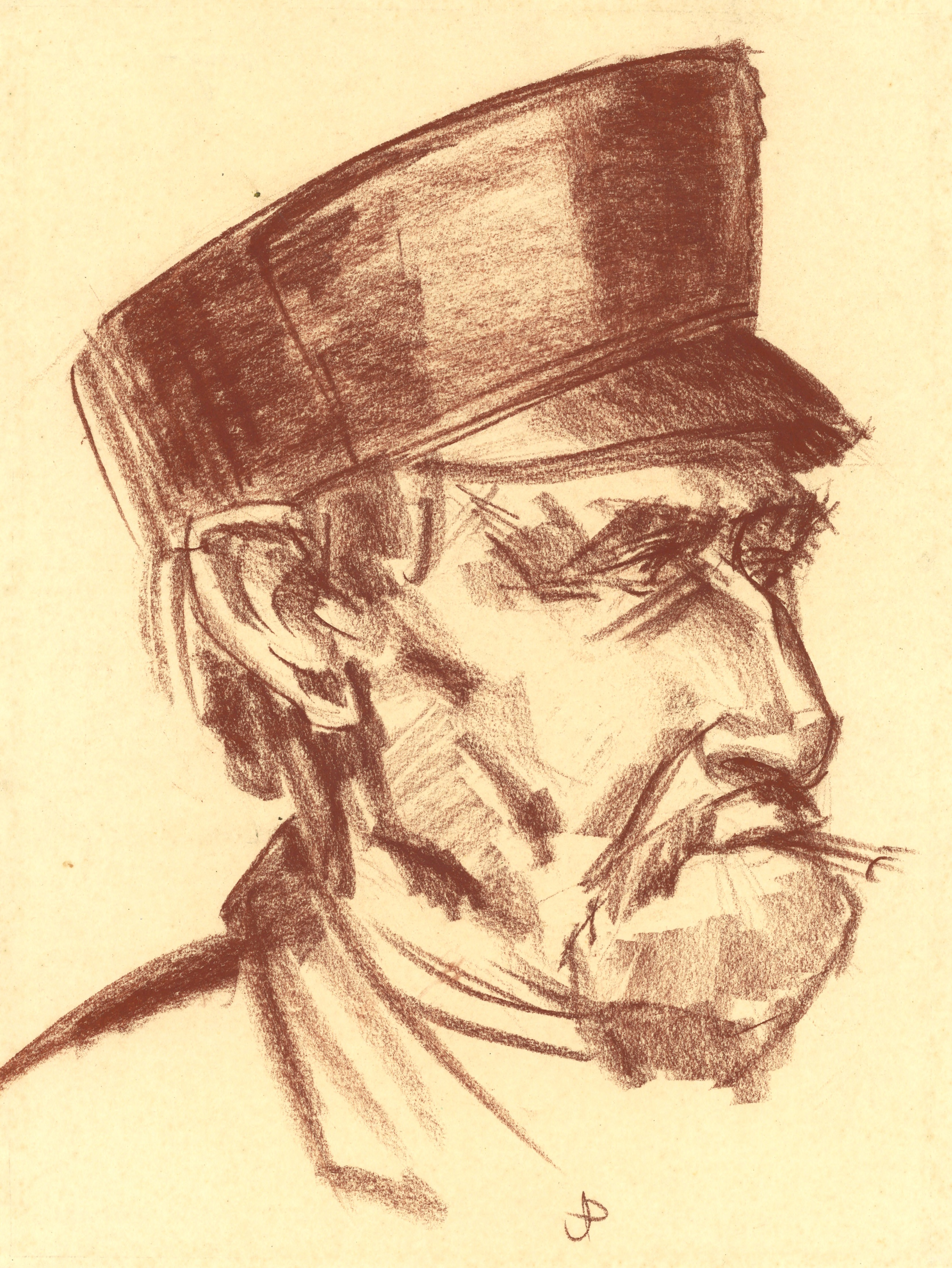 Portret in rood krijt gesigneerd JP. Collectie Regionaal Archief Alkmaar Catalogusnummerː RAA-PON-0354